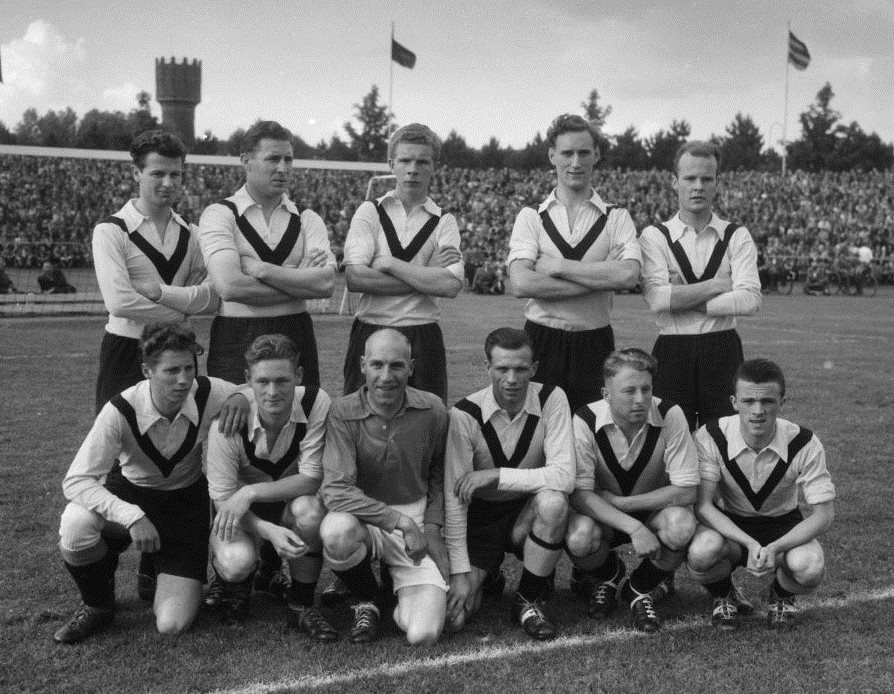 DOS elftal.